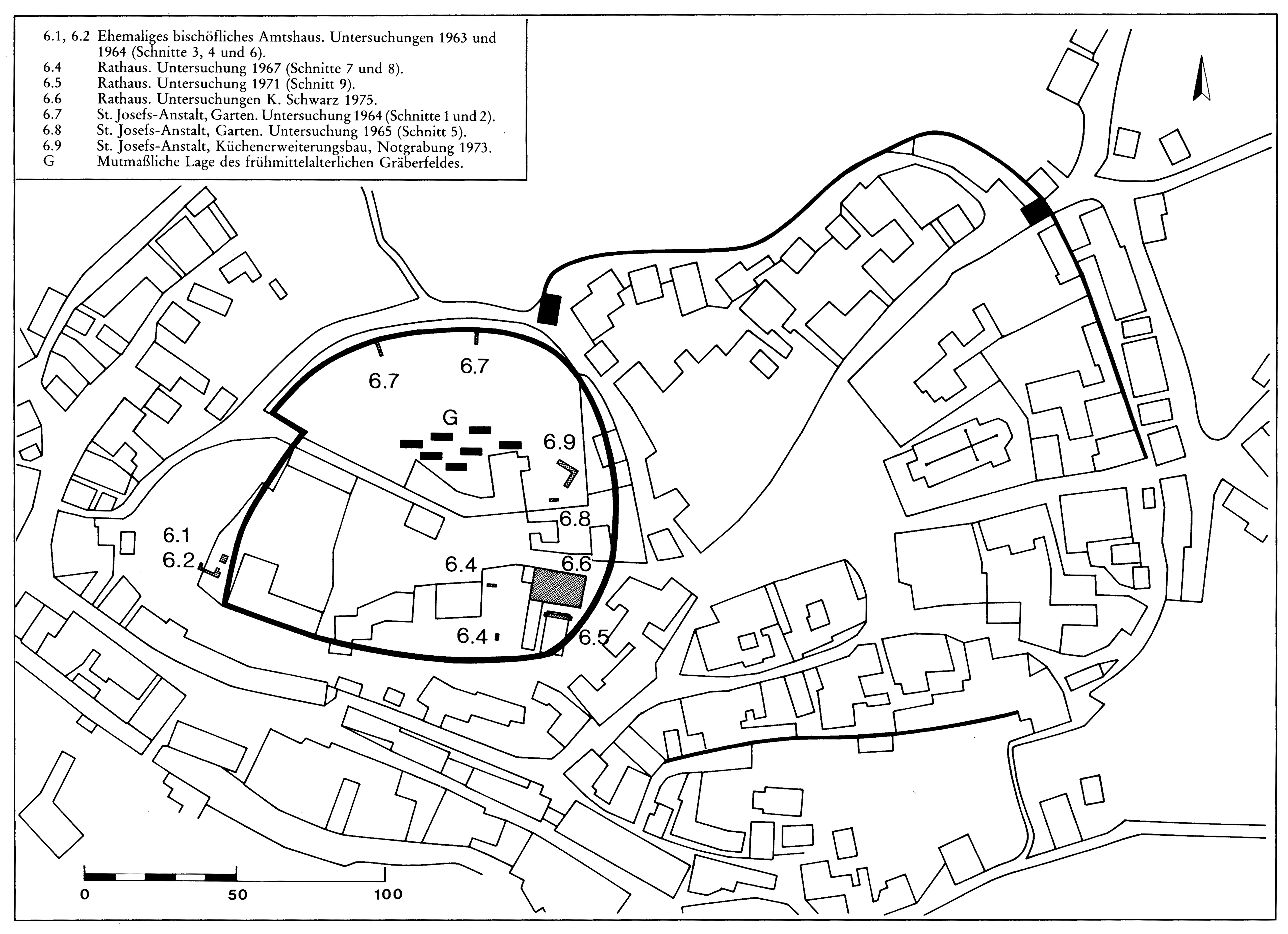 Zeichnung der zwischen 1963-1973 auf dem Burgkunstadter Burgberg stattgefundenen Ausgrabungen.